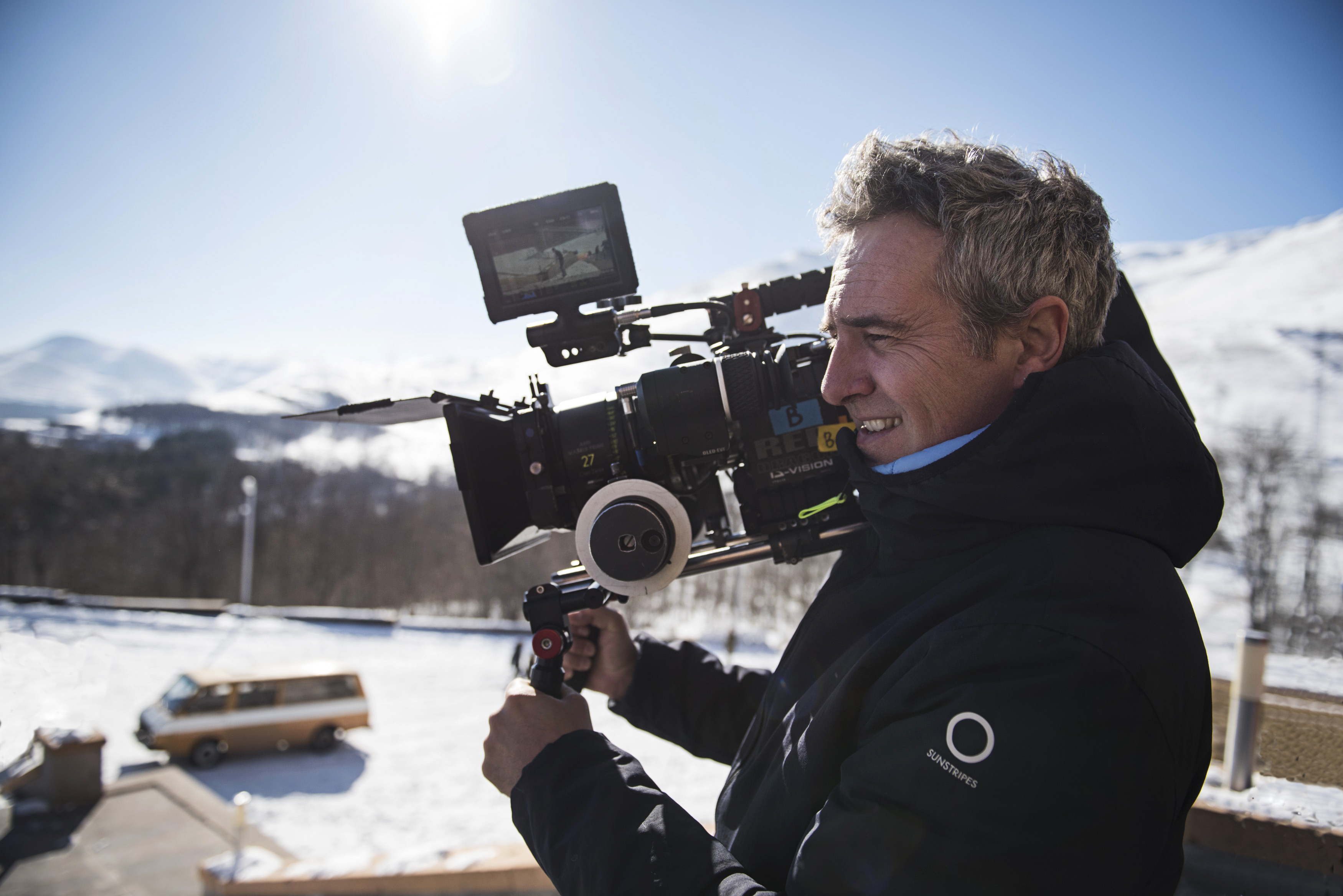 sevan, armenia